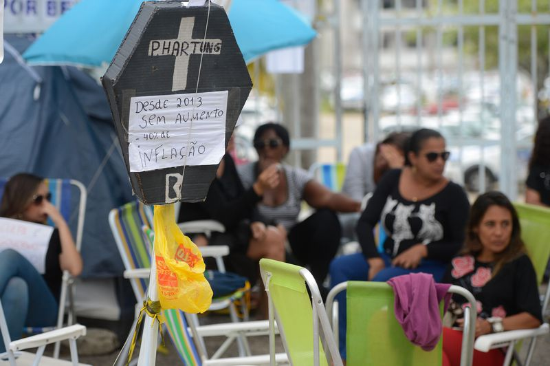 "Mulheres e familiares de policiais continuam acampadas na porta dos Batalhões da Polícia Militar"